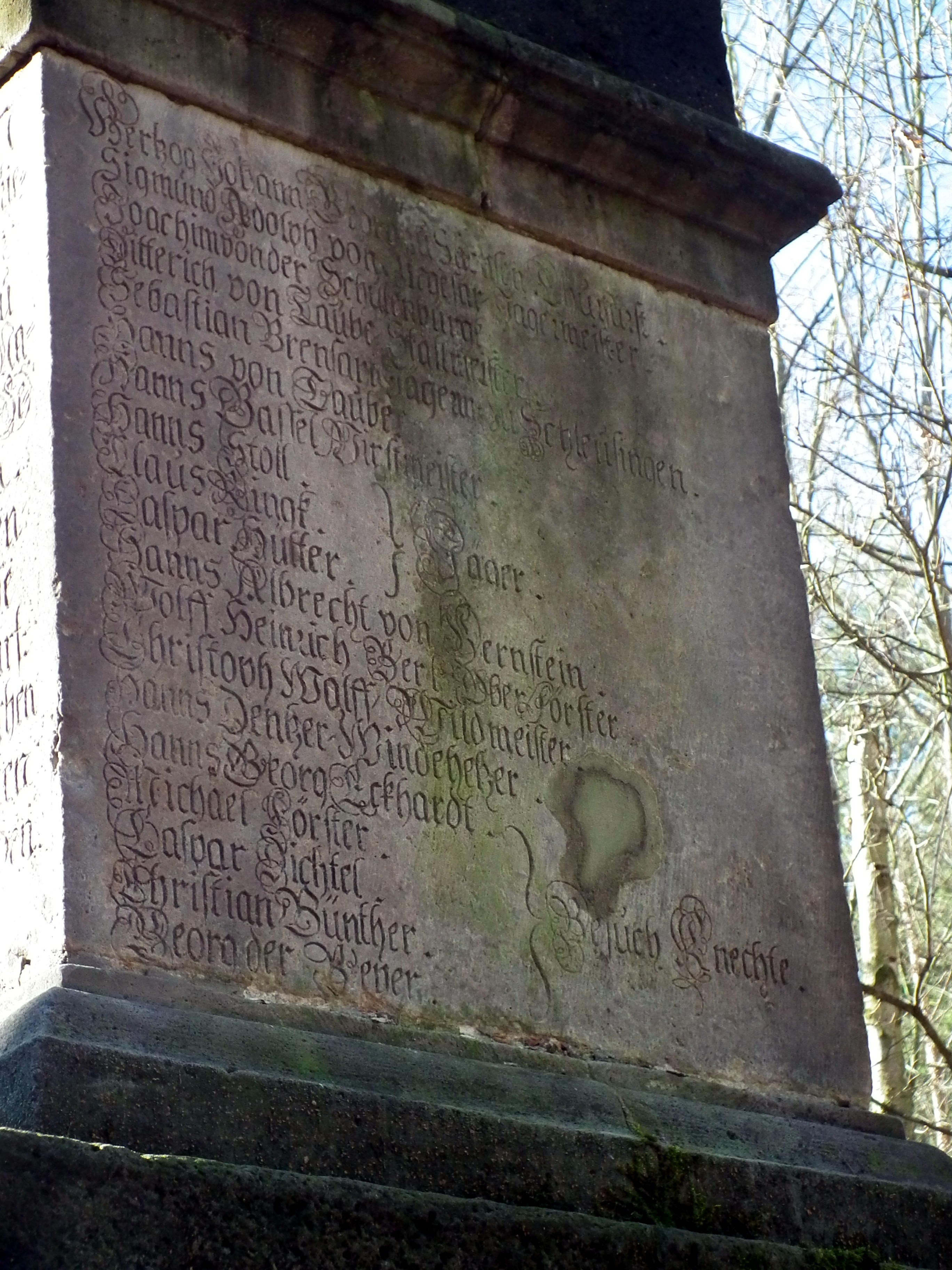 Wolfssäule Friedewald, Weinböhla, Sachsen, Deutschland